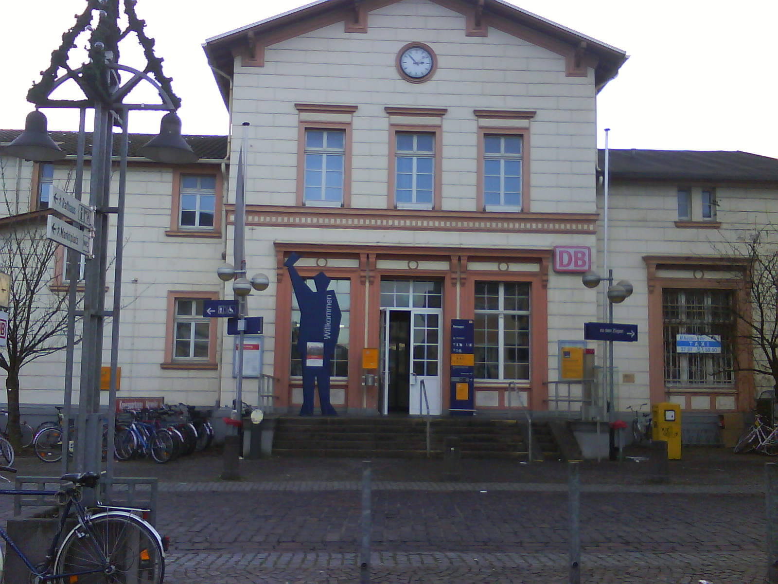 Frontansicht Bahnhof Remagen.